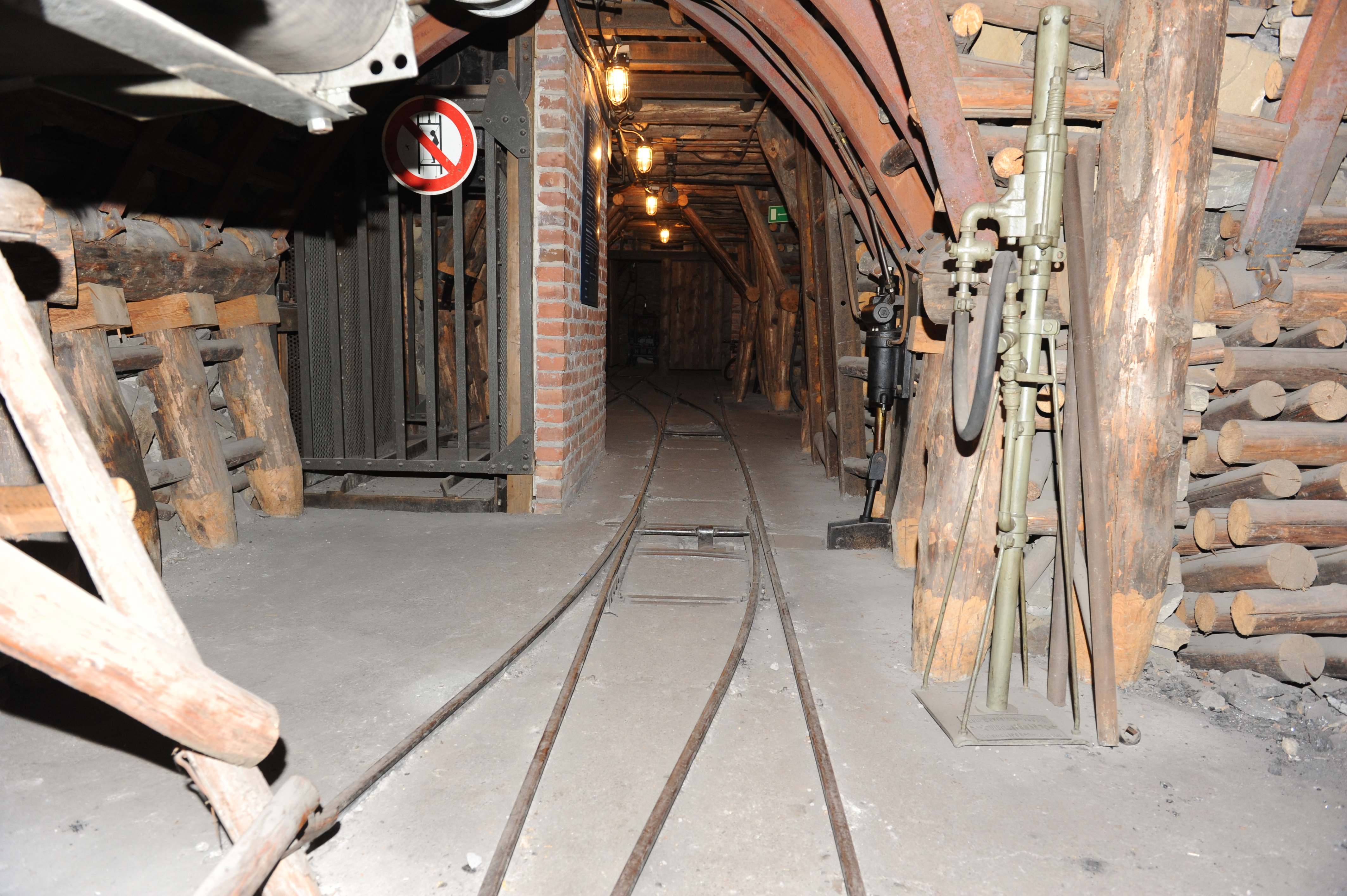 Köln, Barbarastollen 05